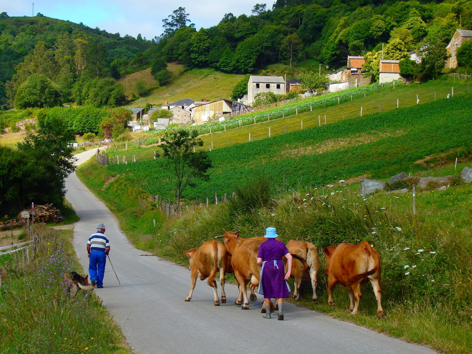 Vista de Lousada, Sasdónigas, Mondoñedo, España